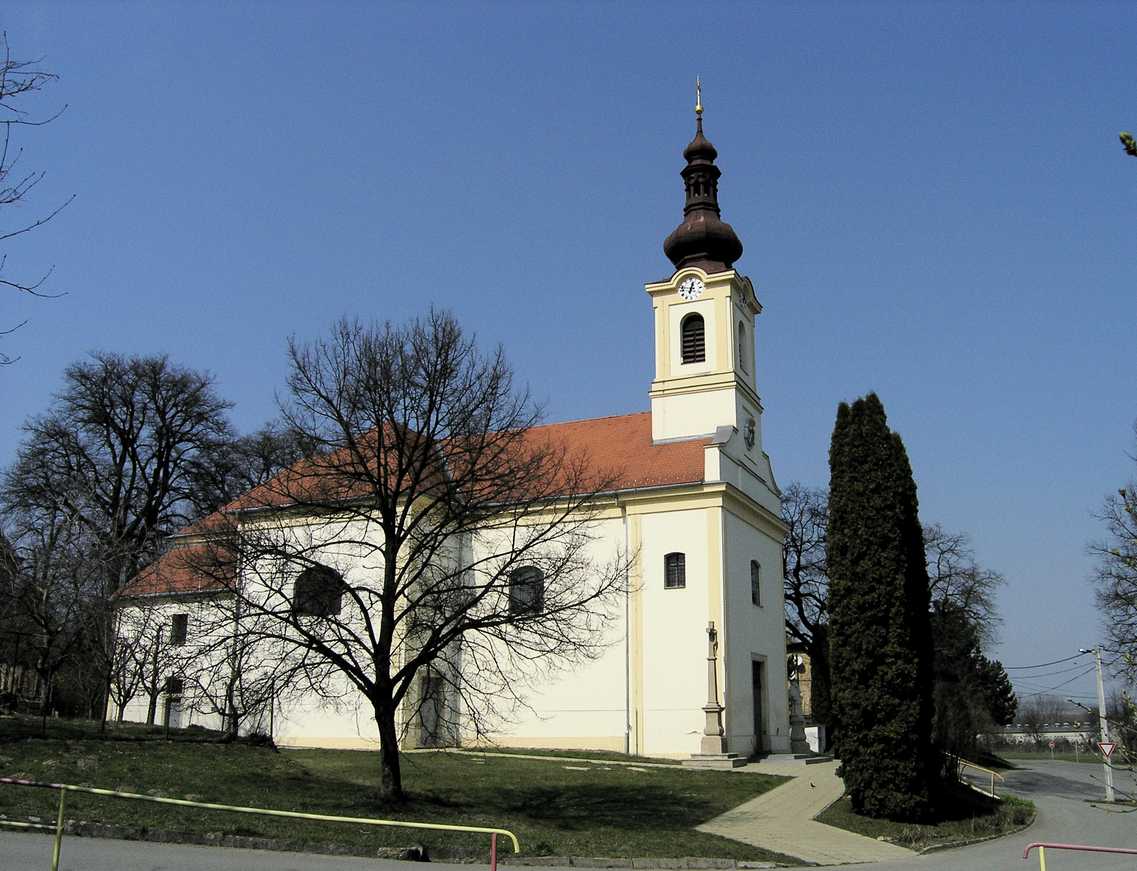 Kostel sv. Petra a Pavla v Milonicích (Vyškovsko). Vystaven 1805 - 1807. V průčelí vsazen erb rodu Lichtensteinů.